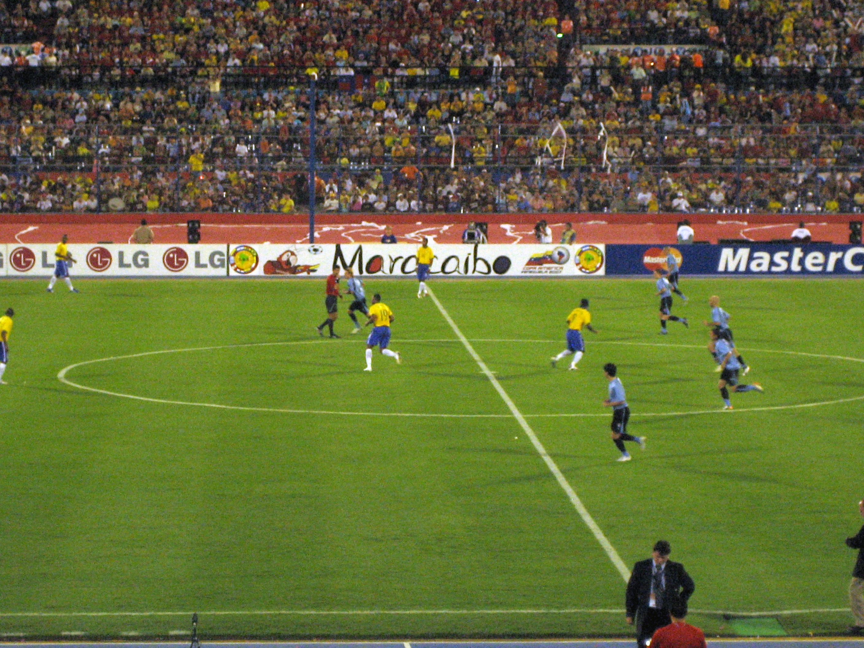 Brasil vs. Uruguay, Copa América 2007, Venezuela.